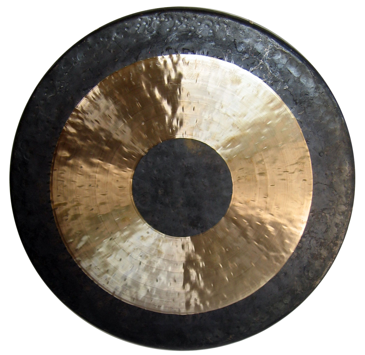 Հաղորդման գոնգը